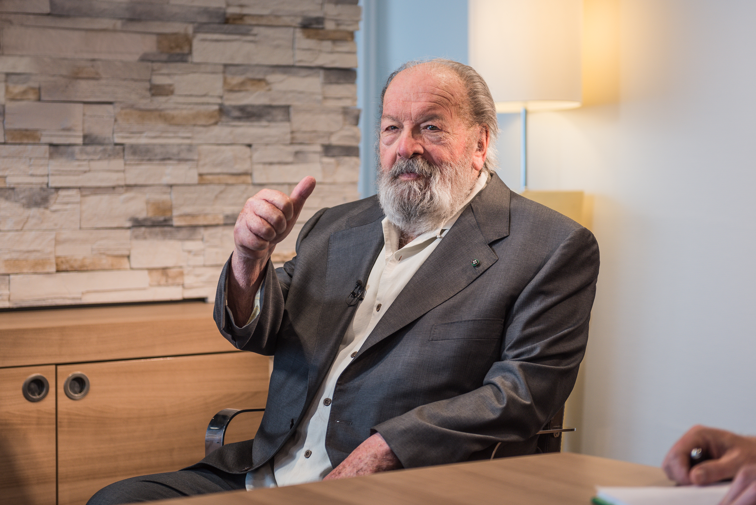 Bud Spencer 2015 in Berlin.